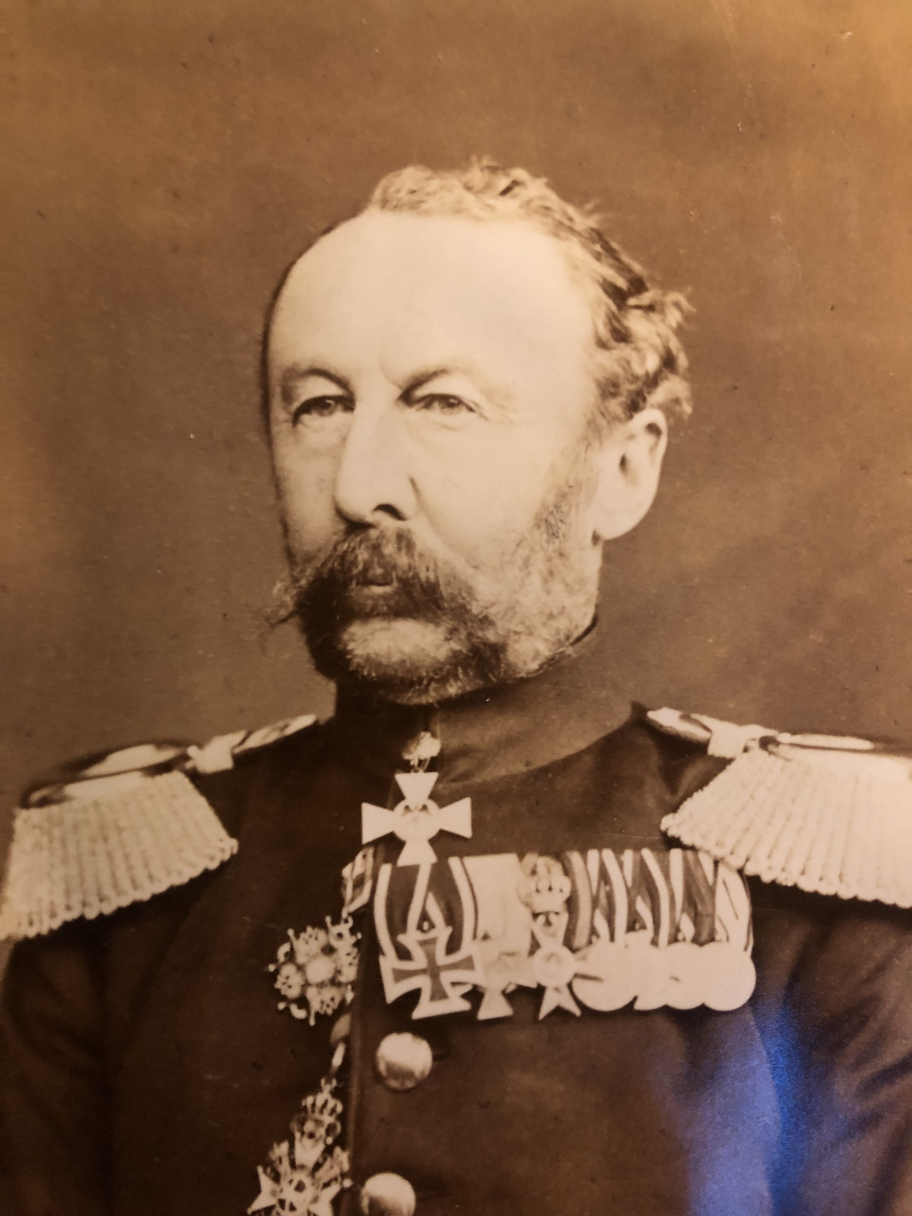 Foto aus Nachlass um die 1885